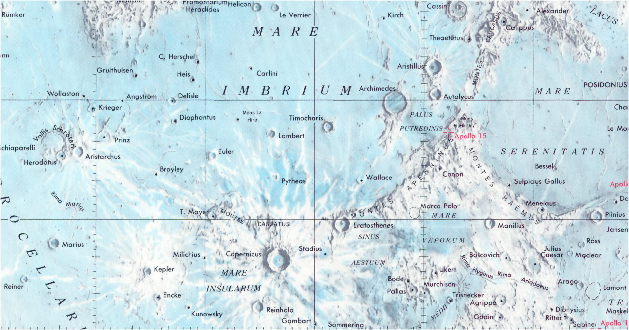 Cráter lunar Pytheas. Localización. (Lunar Chart LPC1. Second Edition)